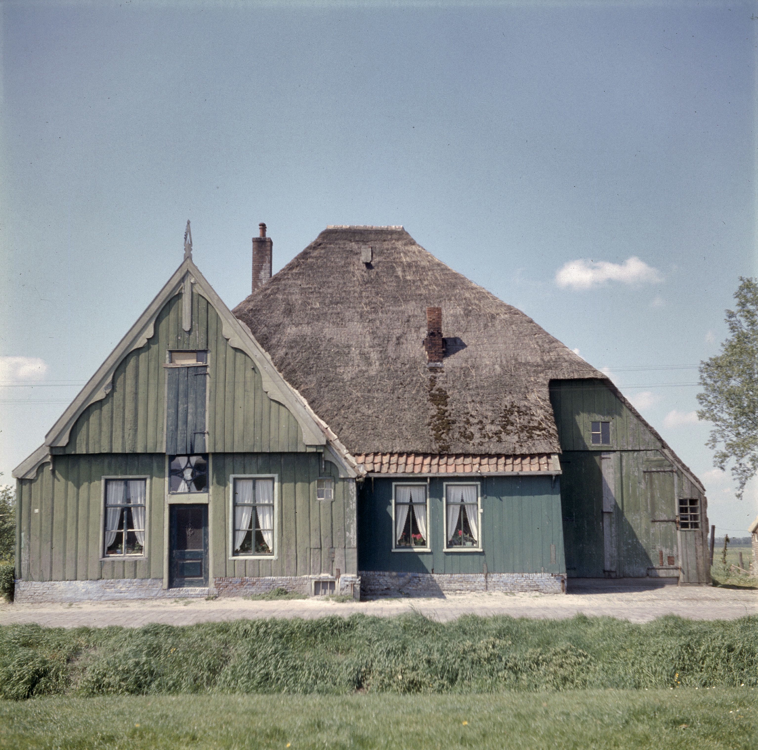 Boerderijen/ Stolpboerderij: Overzicht voorgevel, met makelaar en windveren